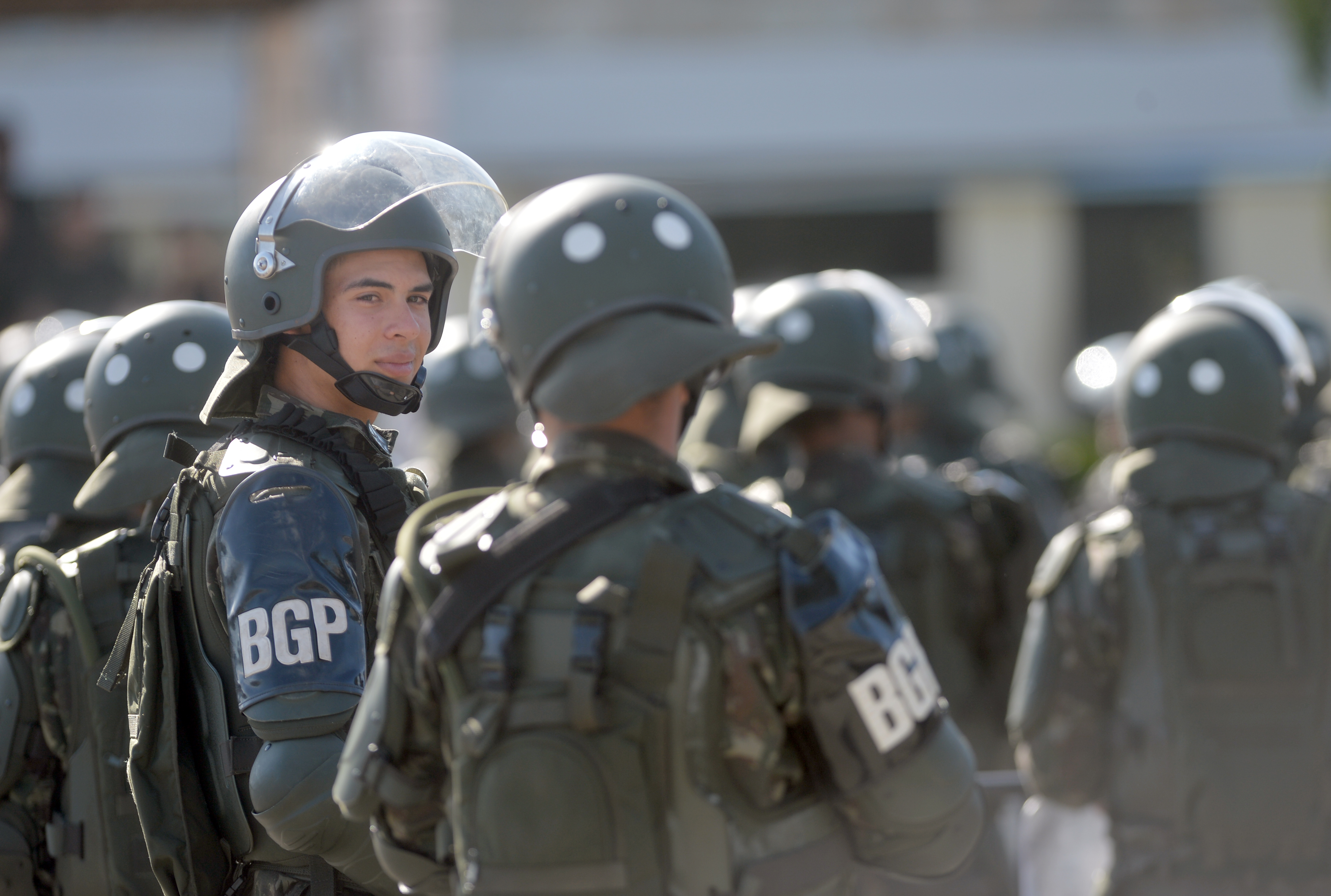 18/02/2016, Brasília - DF Fotos: Tereza Sobreira